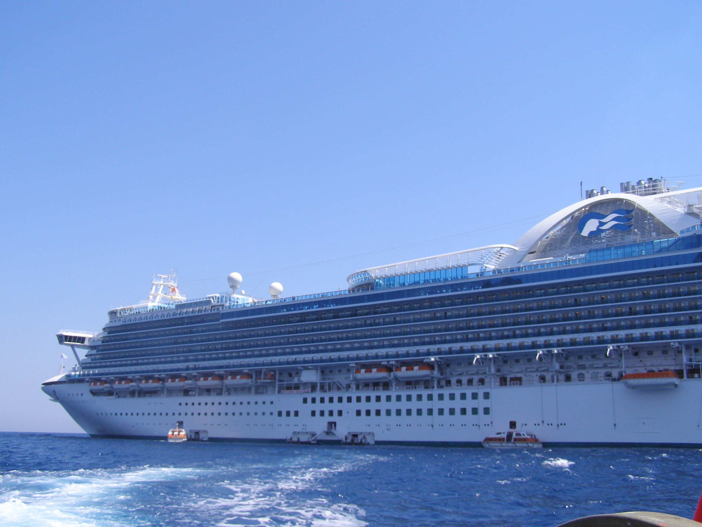 Emerald Princess en la Costa Azul francesa.